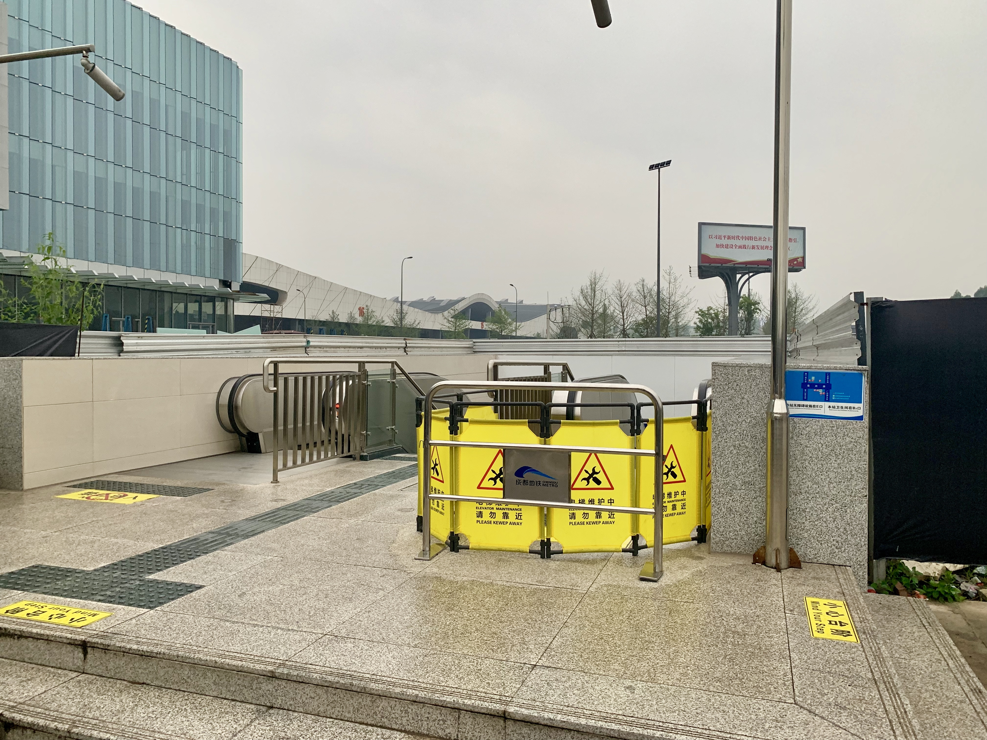 成都地铁广州路站